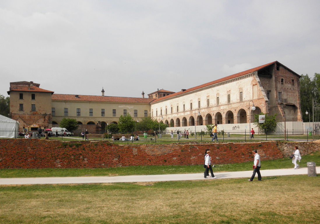 Cortile del castello di Melegnano